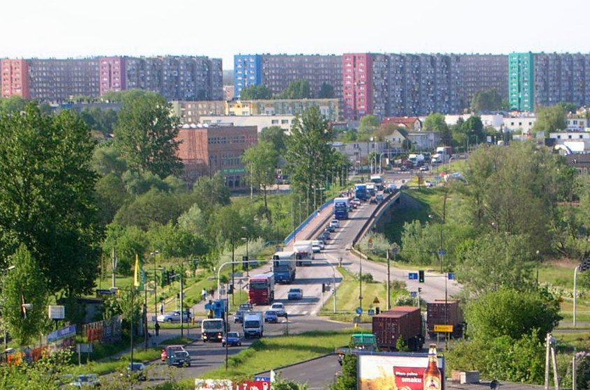 Most Kazimierza Wielkiego - widok z Kapuścisk